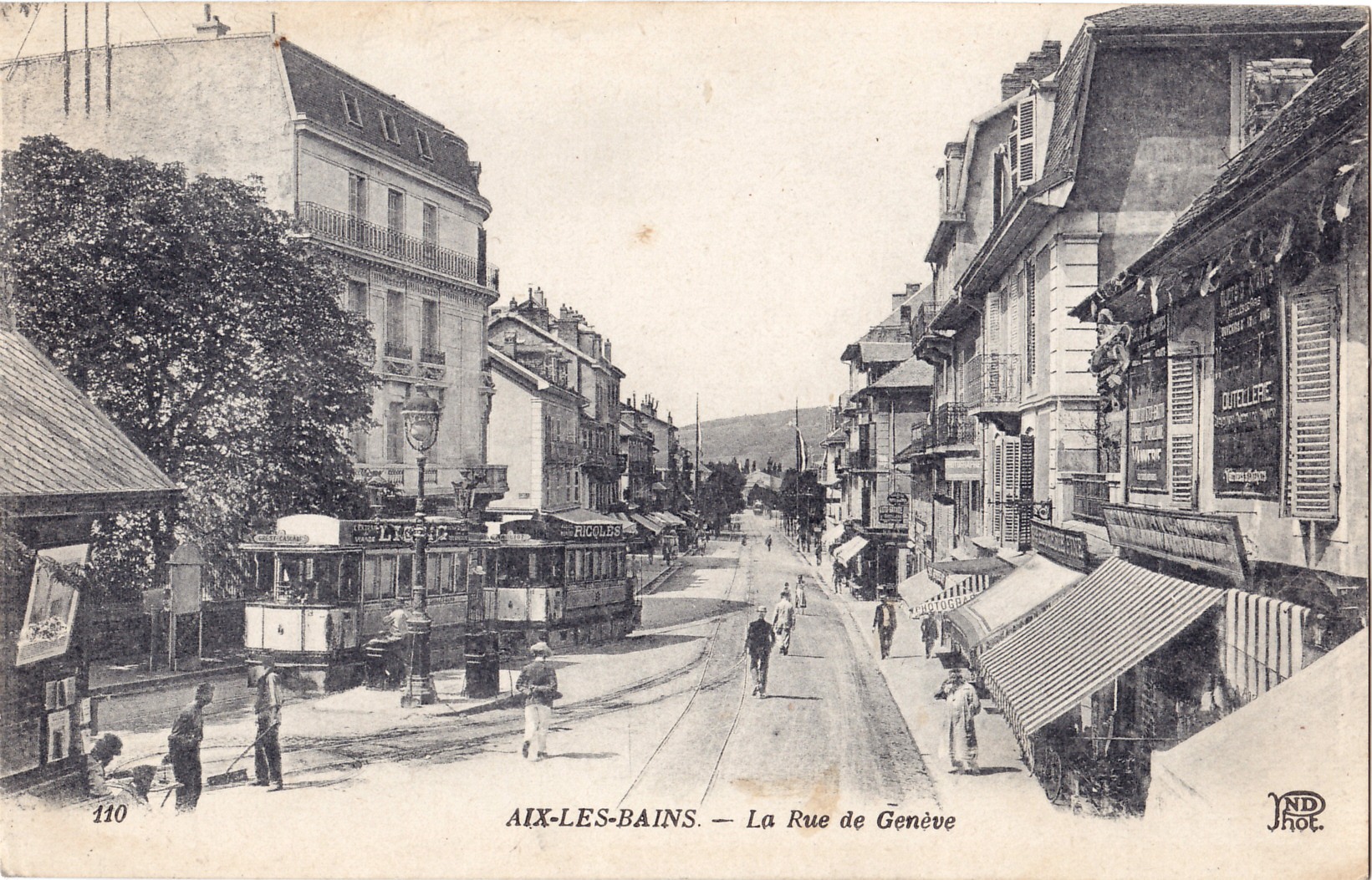 Carte postale ancienne éditée par ND, n°110 : AIX-LES-BAINS - La Rue de Genève